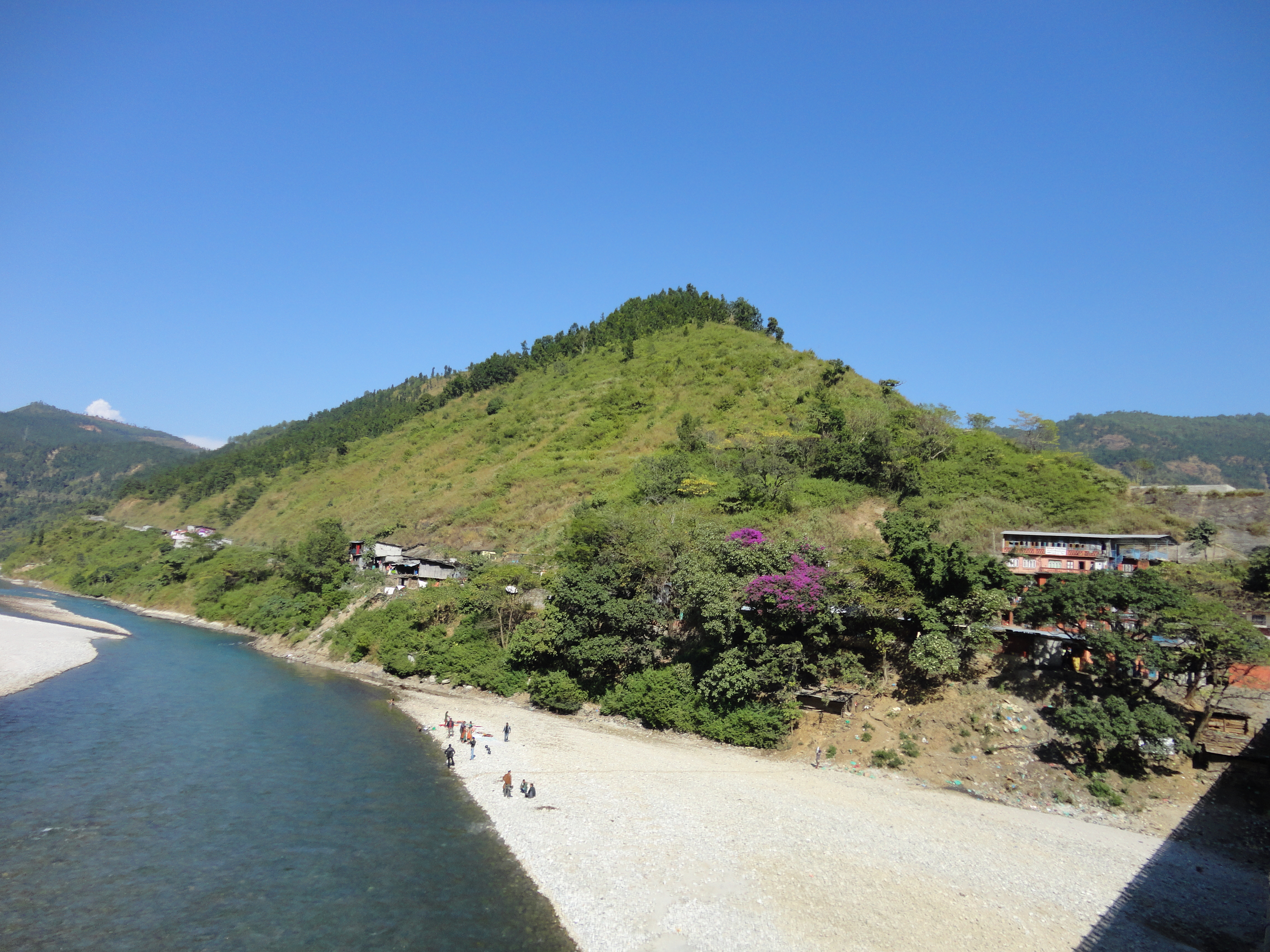 नेपाली: dolalghat_blue_river